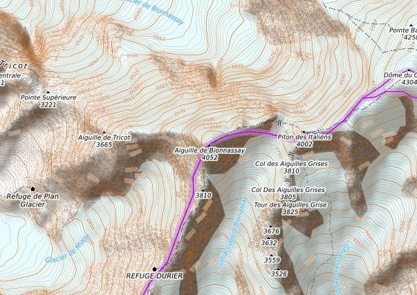 carte réalisée sur umap This map may be incomplete, and may contain errors. Don't rely solely on it for navigation.